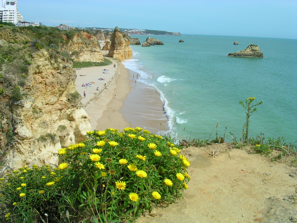 Praia da Rocha, Portimão Valter Jacinto